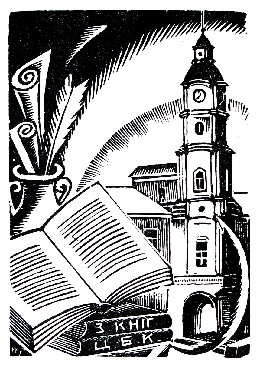 Павел Гуткоўскі. Экслібрыс ЦБК (Цэнтральнага бюро краязнаўства). Цынкаграфскае клішэ.